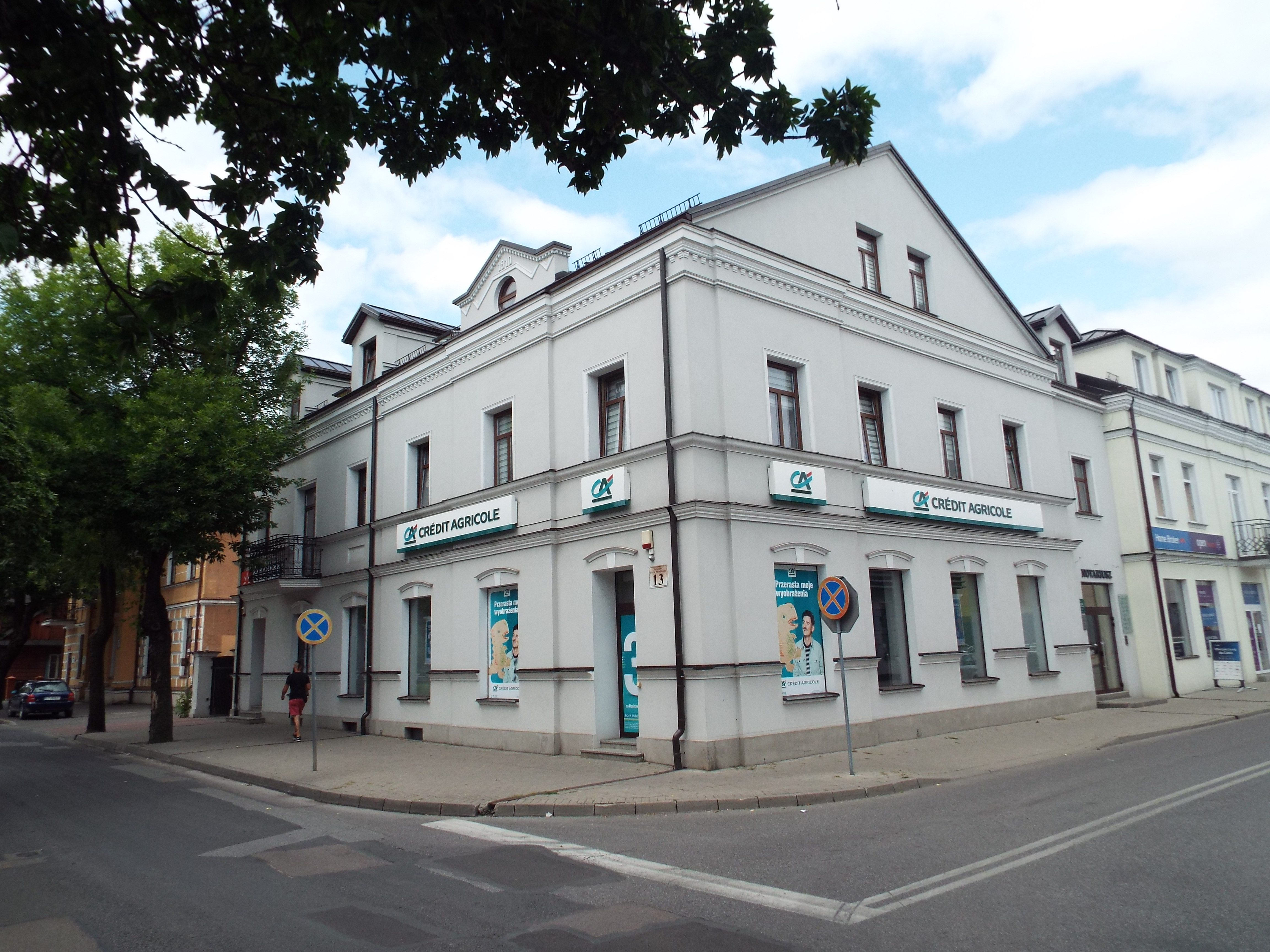 Biała Podlaska, ul. Piłsudskiego 13